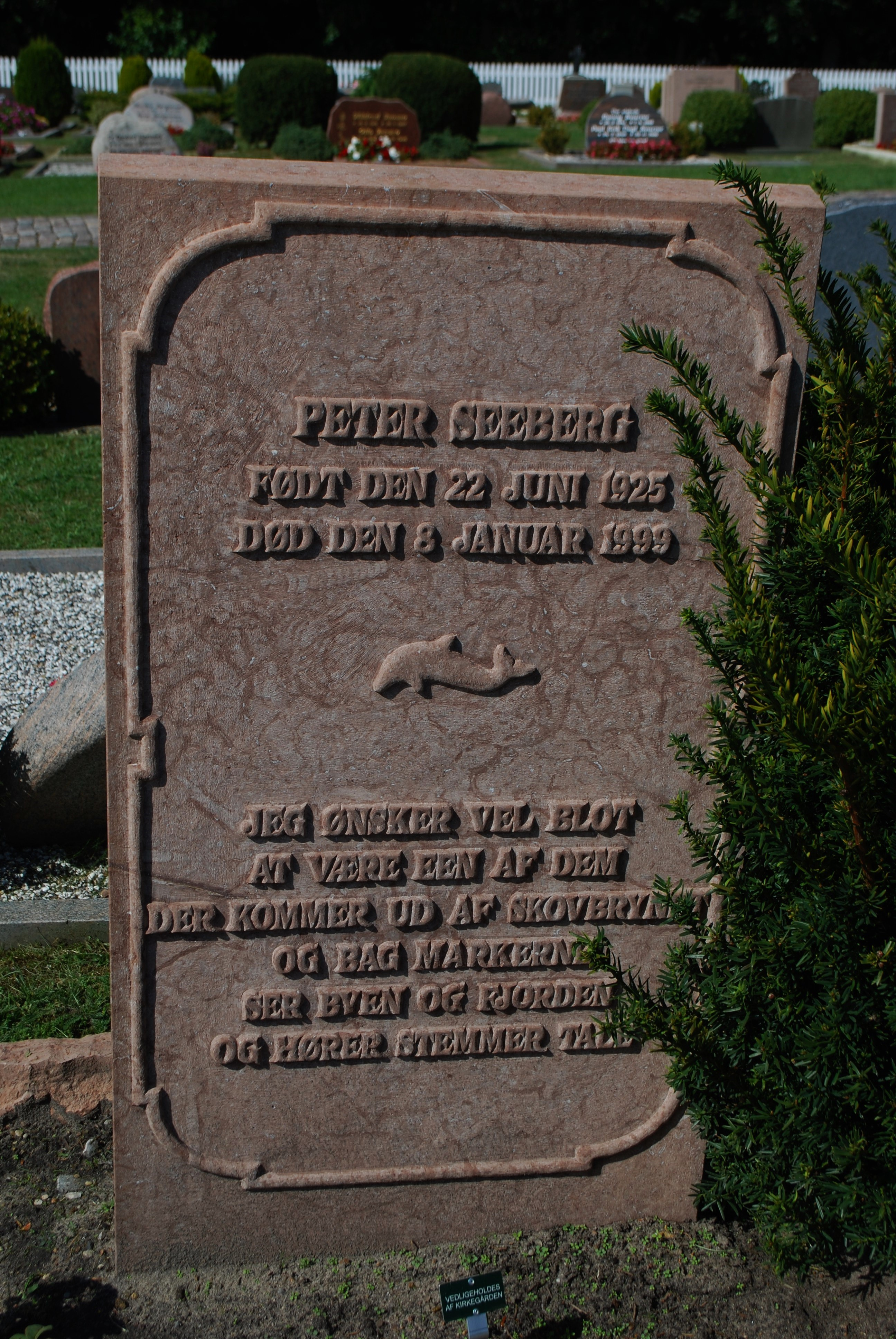 Peter Seebergs gravsten på Rømø Kirkegård